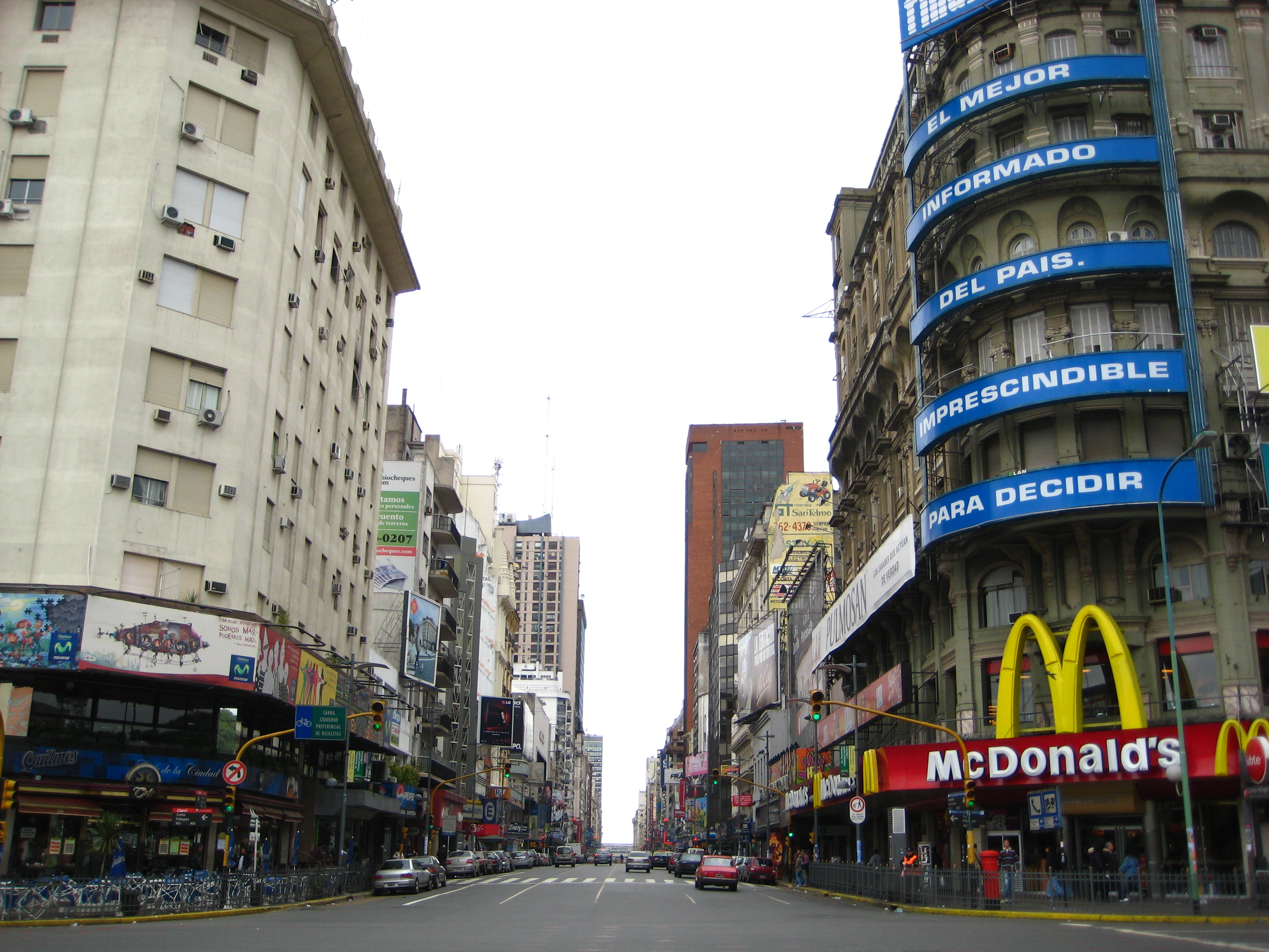 Avenida Corrientes (esquina con Carlos Pellegrini), barrio de San Nicolás, Buenos Aires, Argentina.